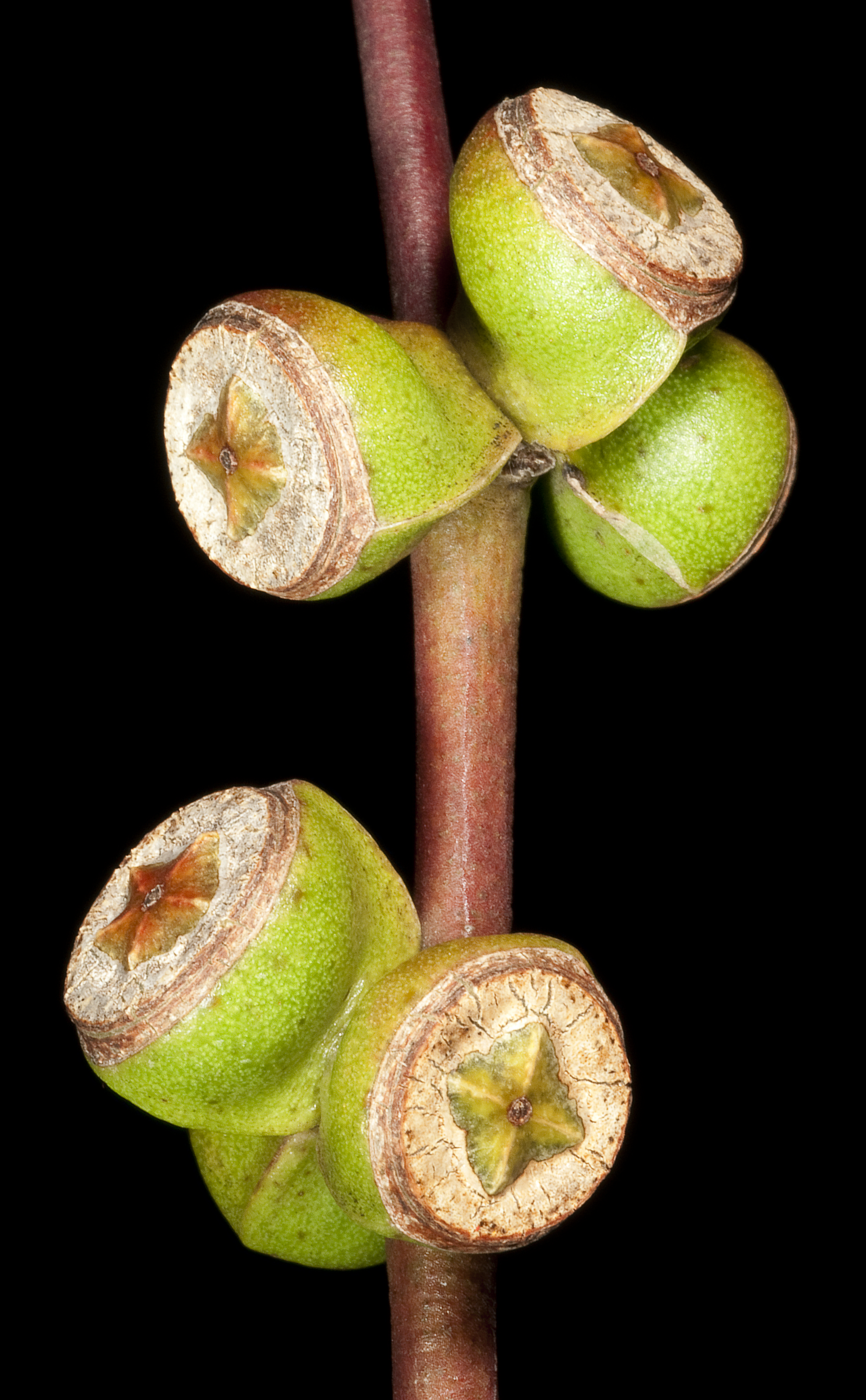 KRT4496 Western Australian Herbarium